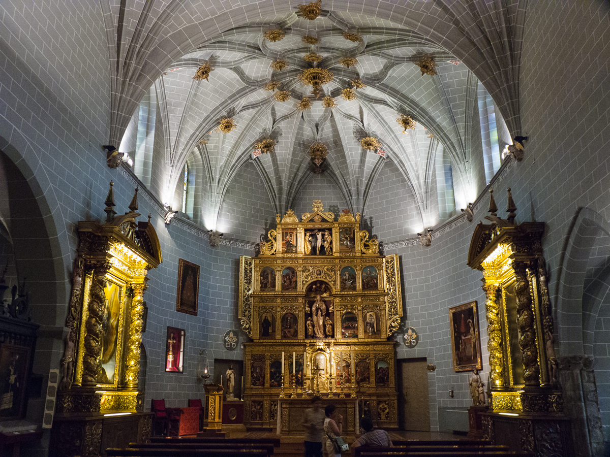 22082011 191938 PIR_SEL 1253